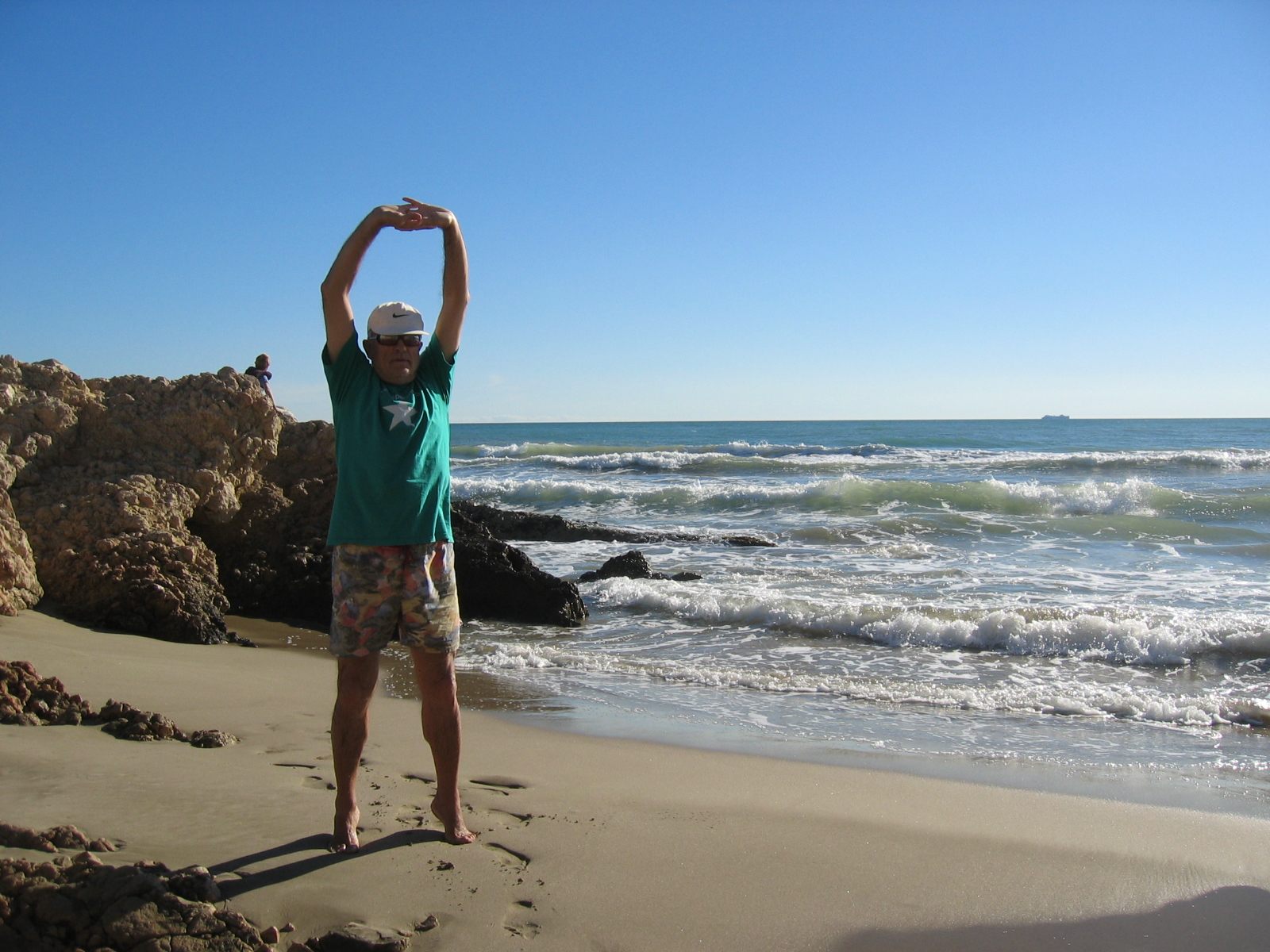 1r moviment de txi kung - Baduanjin